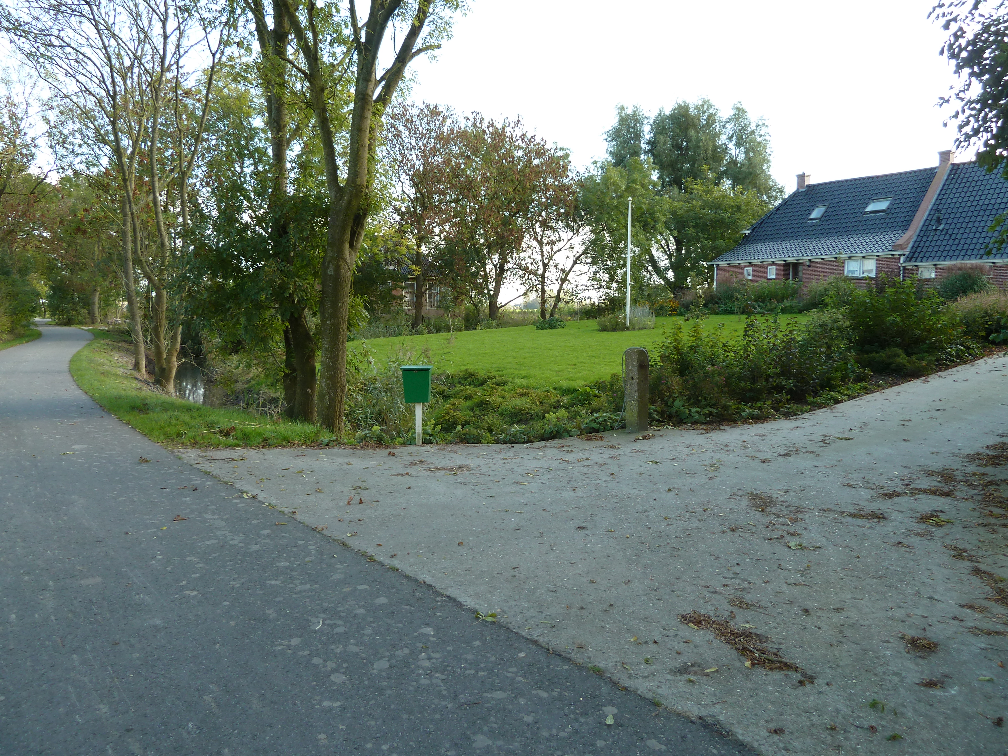 De twee boerderijen van Hilmahuis (Groningen, Nederland)